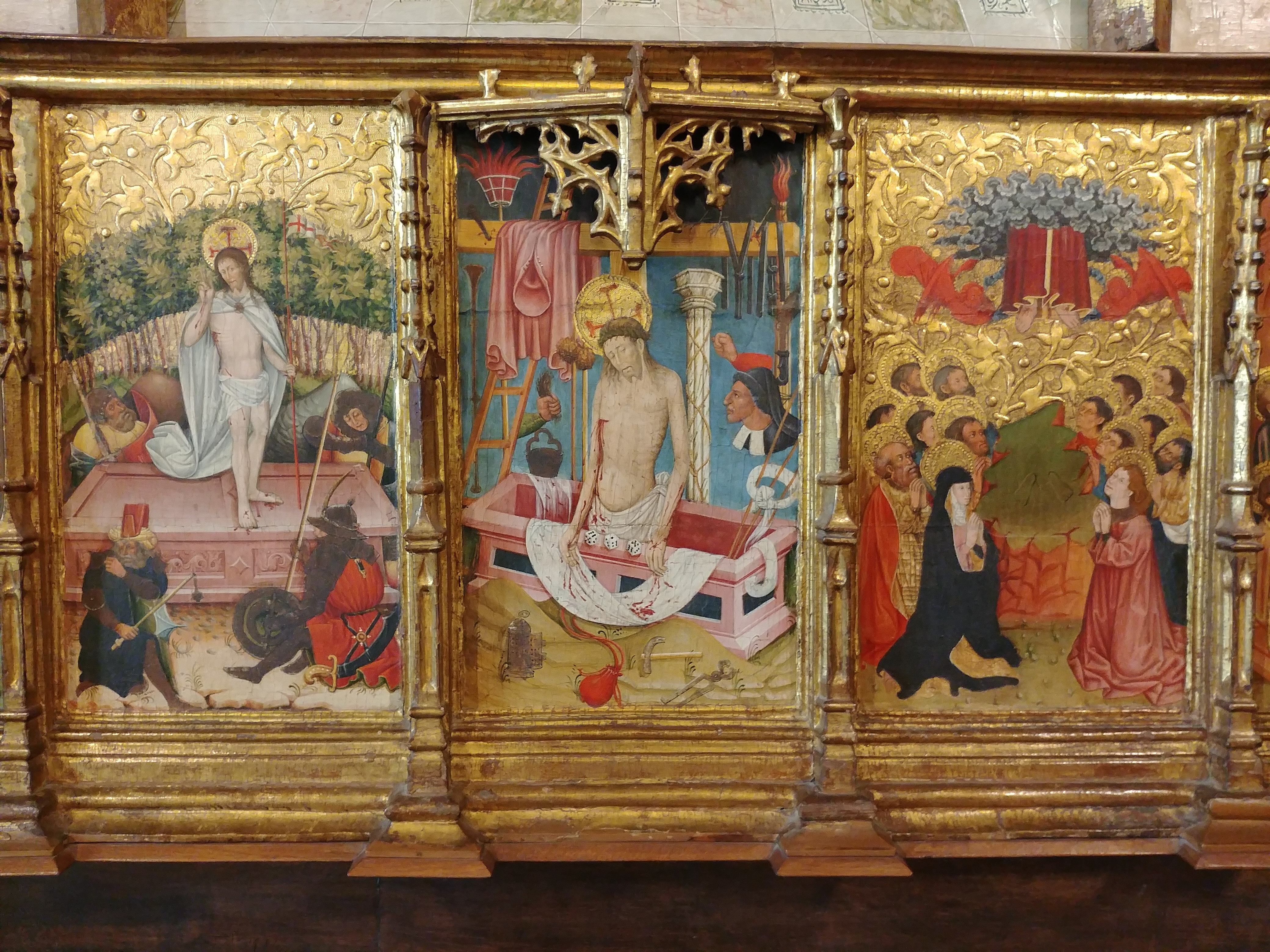 Escènes bíbliques de la ressurrecció i ascensió